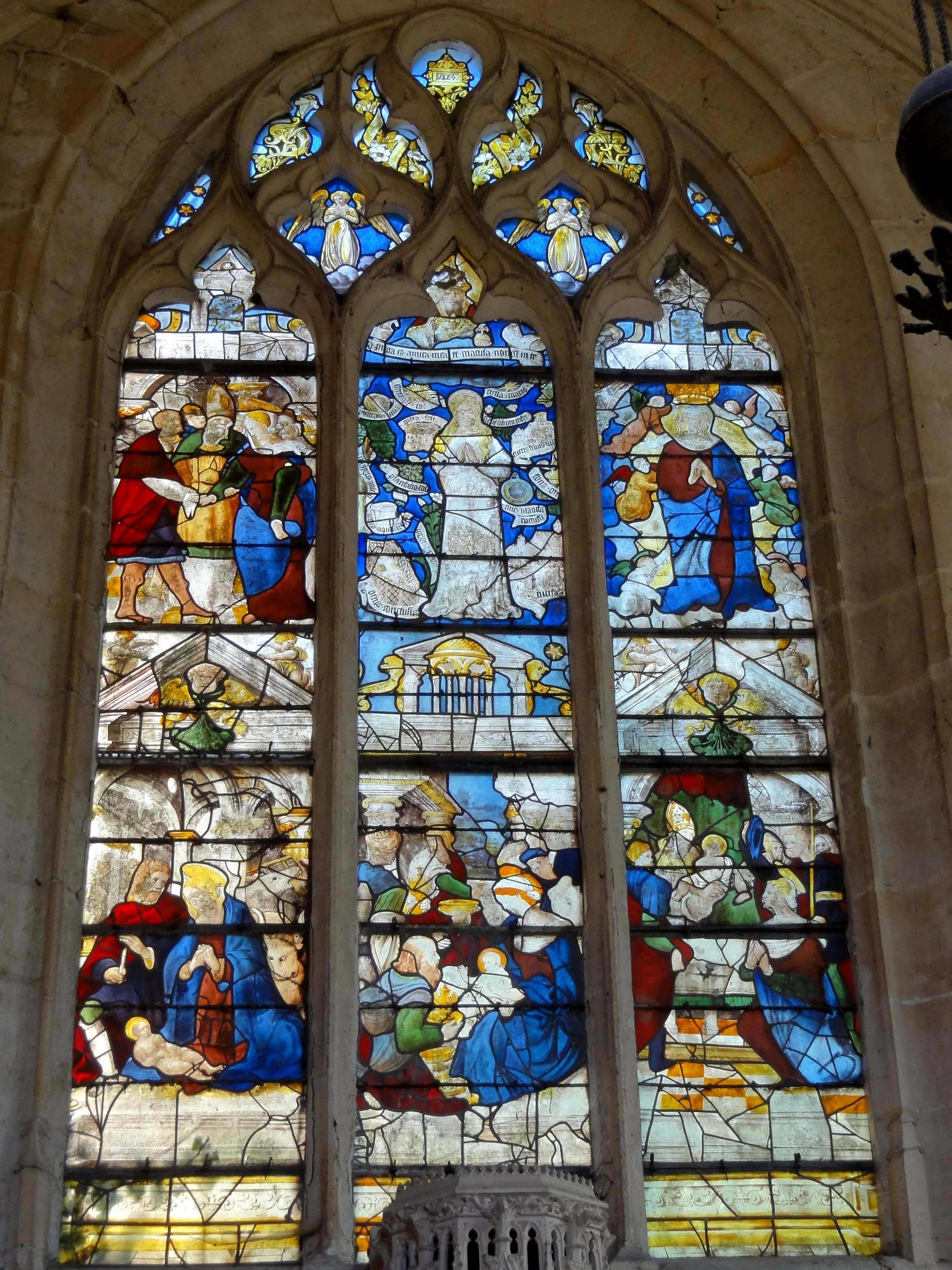 Verrière n° 6, Vie de la Vierge (voir titre). Verrière Renaissance restaurée en 1880 (et non 1820). Elle se trouve au chevet du croisillon sud (n° 6) et non au sud de l'abside (n° 4).